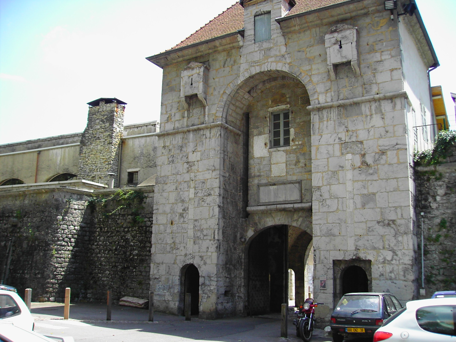 Porte Saint Laurent (1610) au bout de la rue Saint Laurent - Grenoble